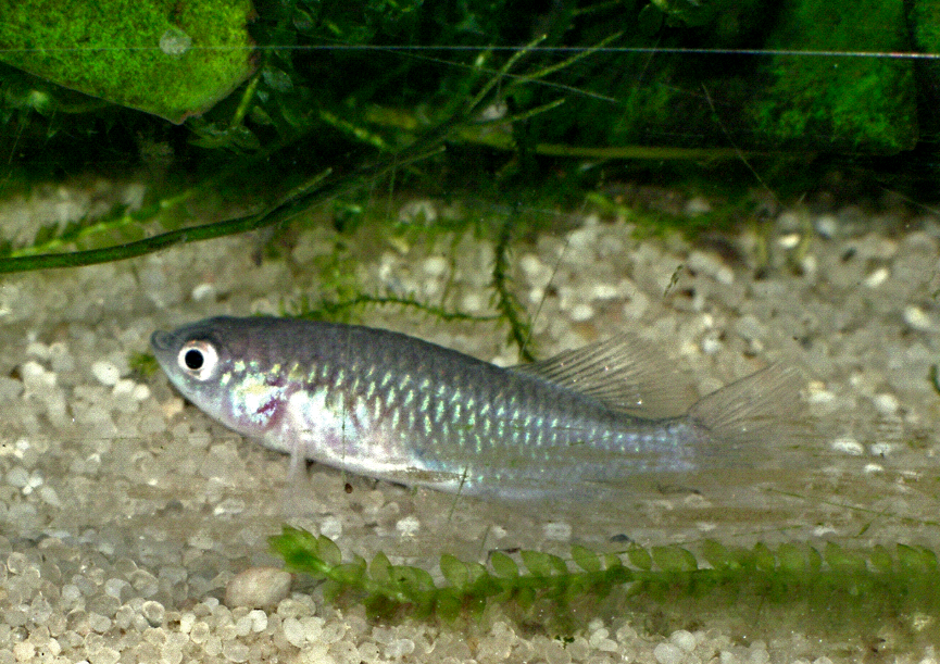 Nothobranchius eggersi (female)